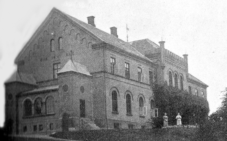 Nedergård er en gammel gård, som nævnes første gang i 1409 og ligger i Bøstrup Sogn, Langelands Nørre Herred, Tranekær Kommune. Hovedbygningen er opført i 1867 ved J. Trolle.